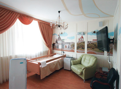 Санкт-Петербургский Детский хоспис. Стационар круглосуточного пребывания